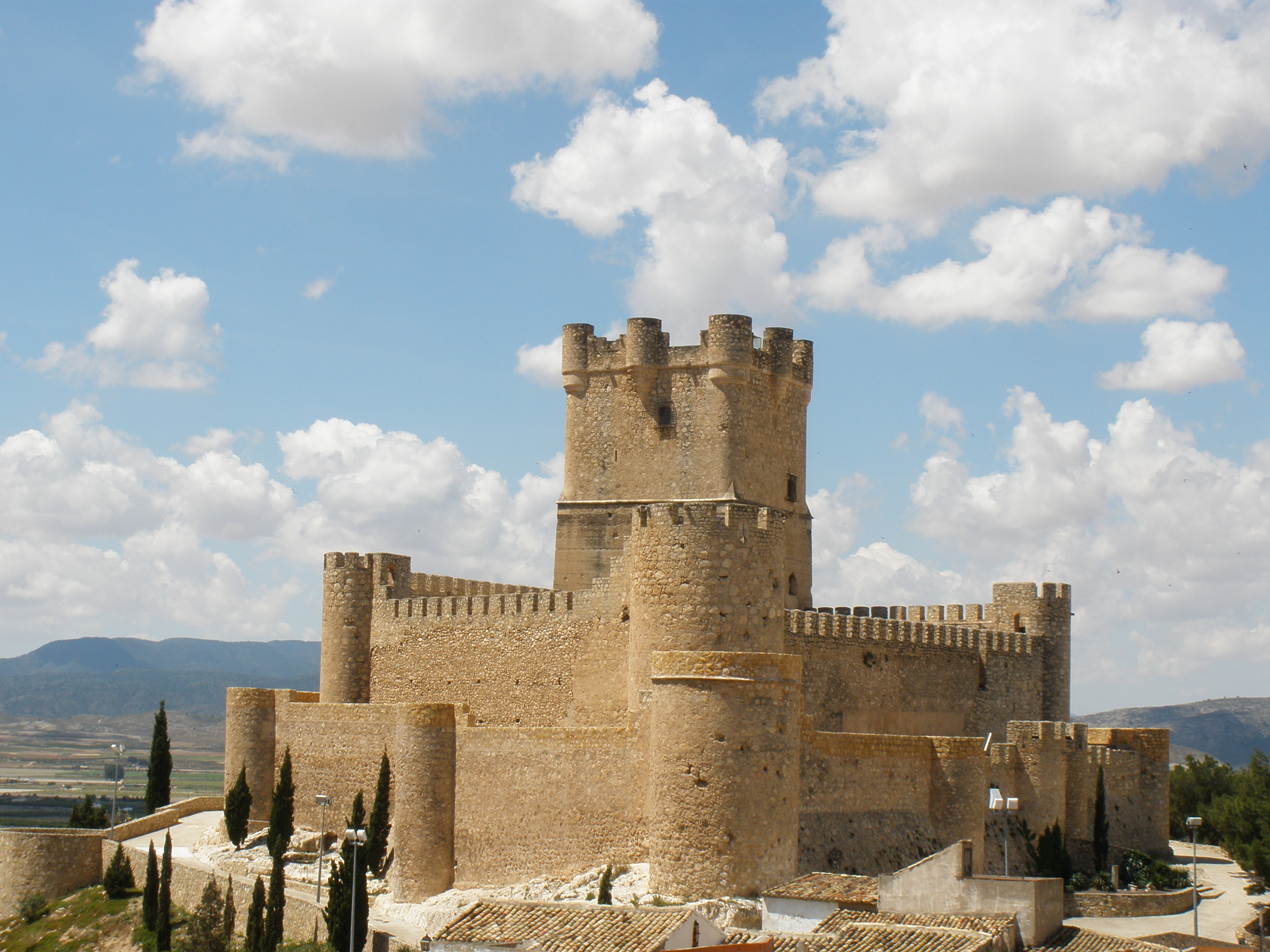 Castillo de Villena. En él se realizan las embajadas mora y cristiana.